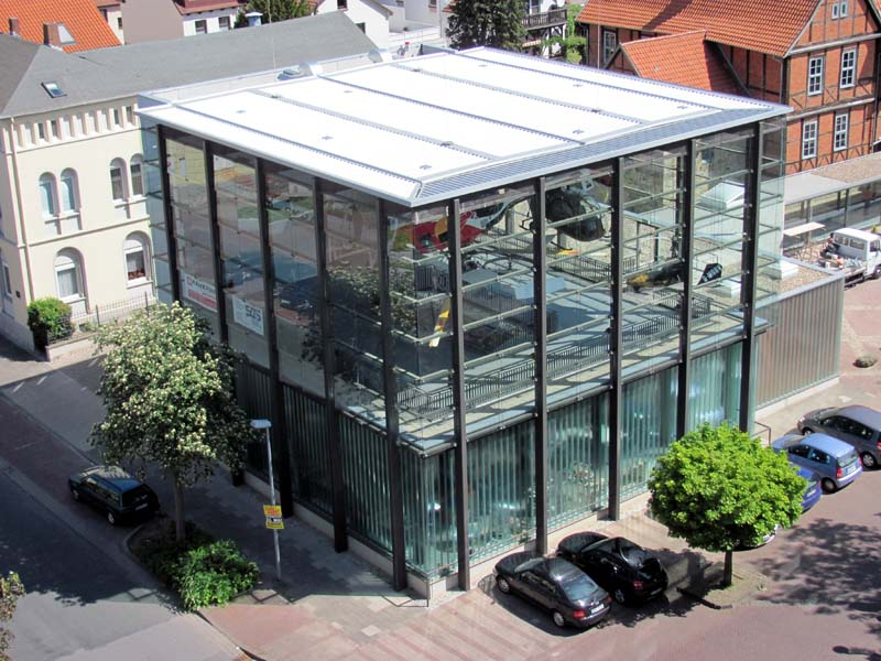 Hubschraubermuseum Bückeburg - Erweiterungsbau - am 09.05.2011